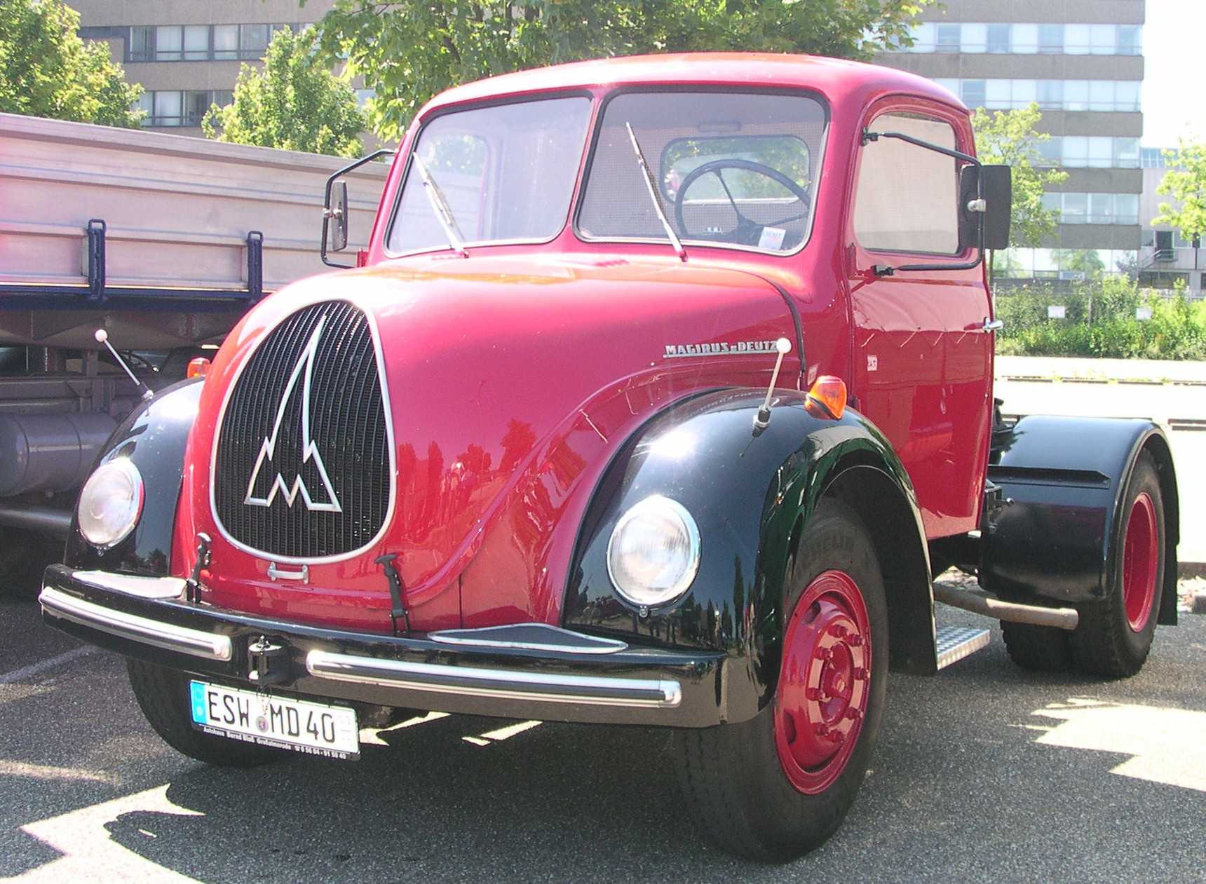 Wörth am Rhein, Oldtimer-Treffen bei Daimler-Chrysler Magirus Rundhauber, kleine Sattelzugmaschine